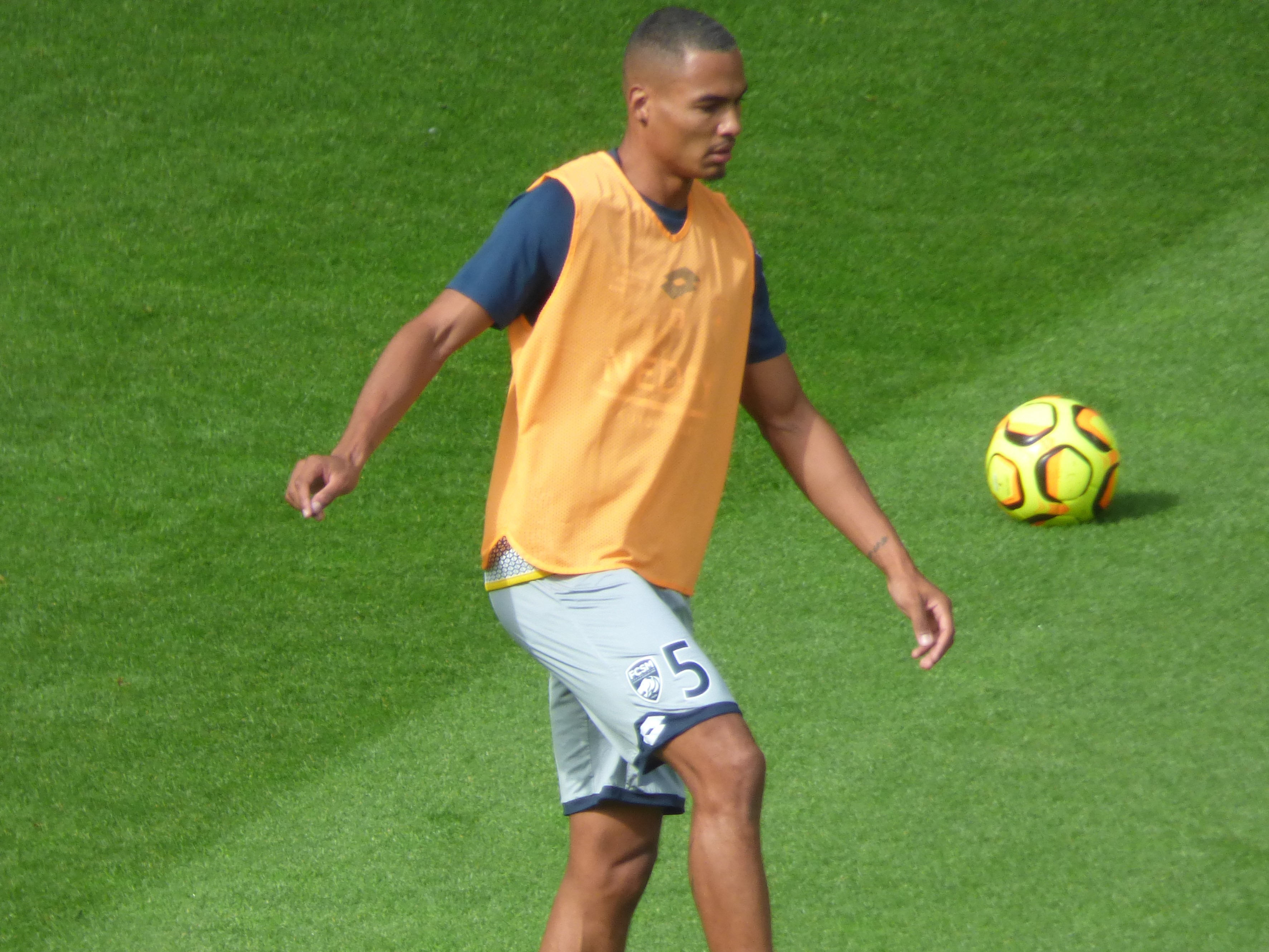 Olivier Verdon avant le match Lens / Sochaux, comptant pour la septième journée du championnat de France de football de Ligue 2, le 15 septembre 2018.